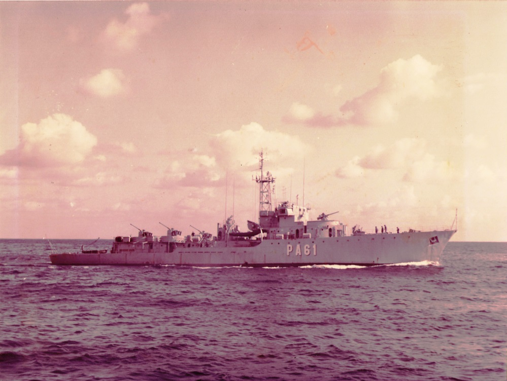 Cobeta Atrevida (F-61), ya como patrullero de altura (PA-61)